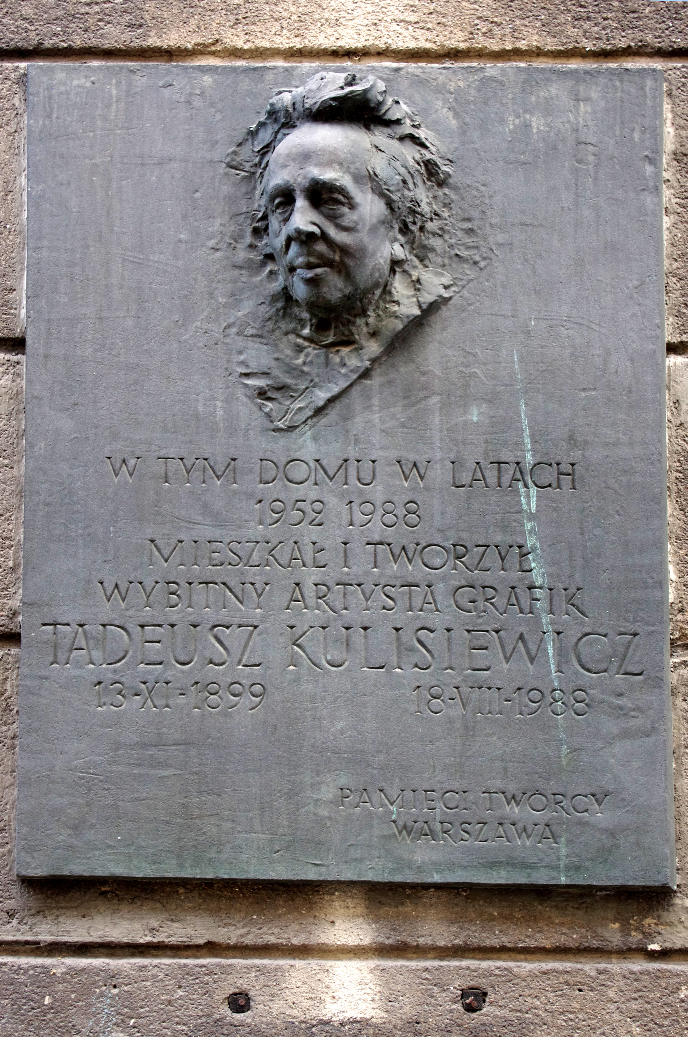 Tablica upamiętniająca grafika Tadeusza Kulisiewicza na domu w którym mieszkał przy ul. Mazowieckiej 7 w Warszawie